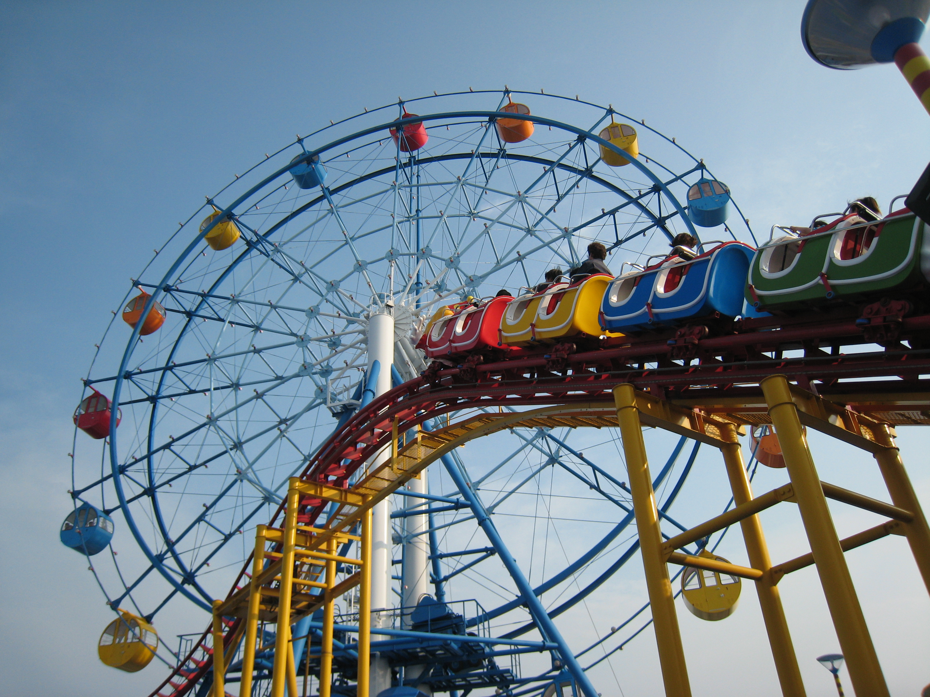 マリーナホップ内マリーナサーカス